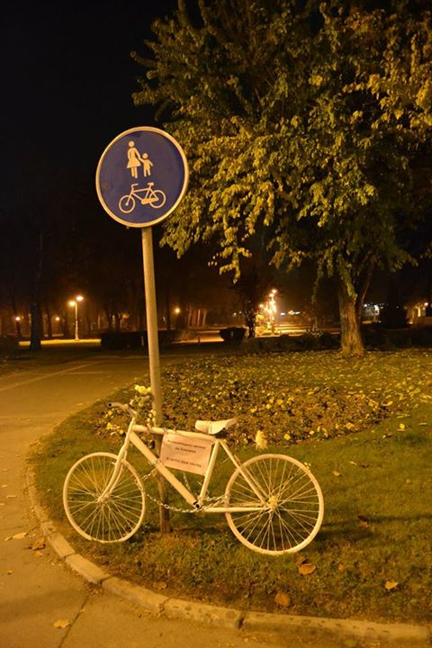 Бел велосипед-споменик поставен Скопје